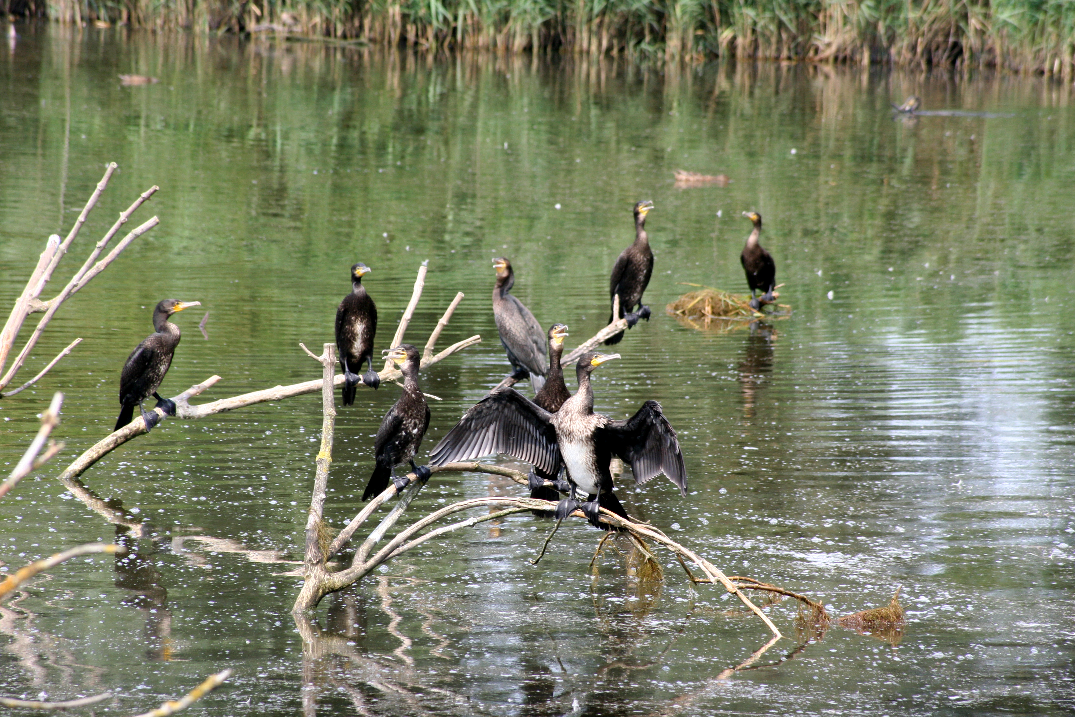 Aalscholvers in de Lepelaarplassen